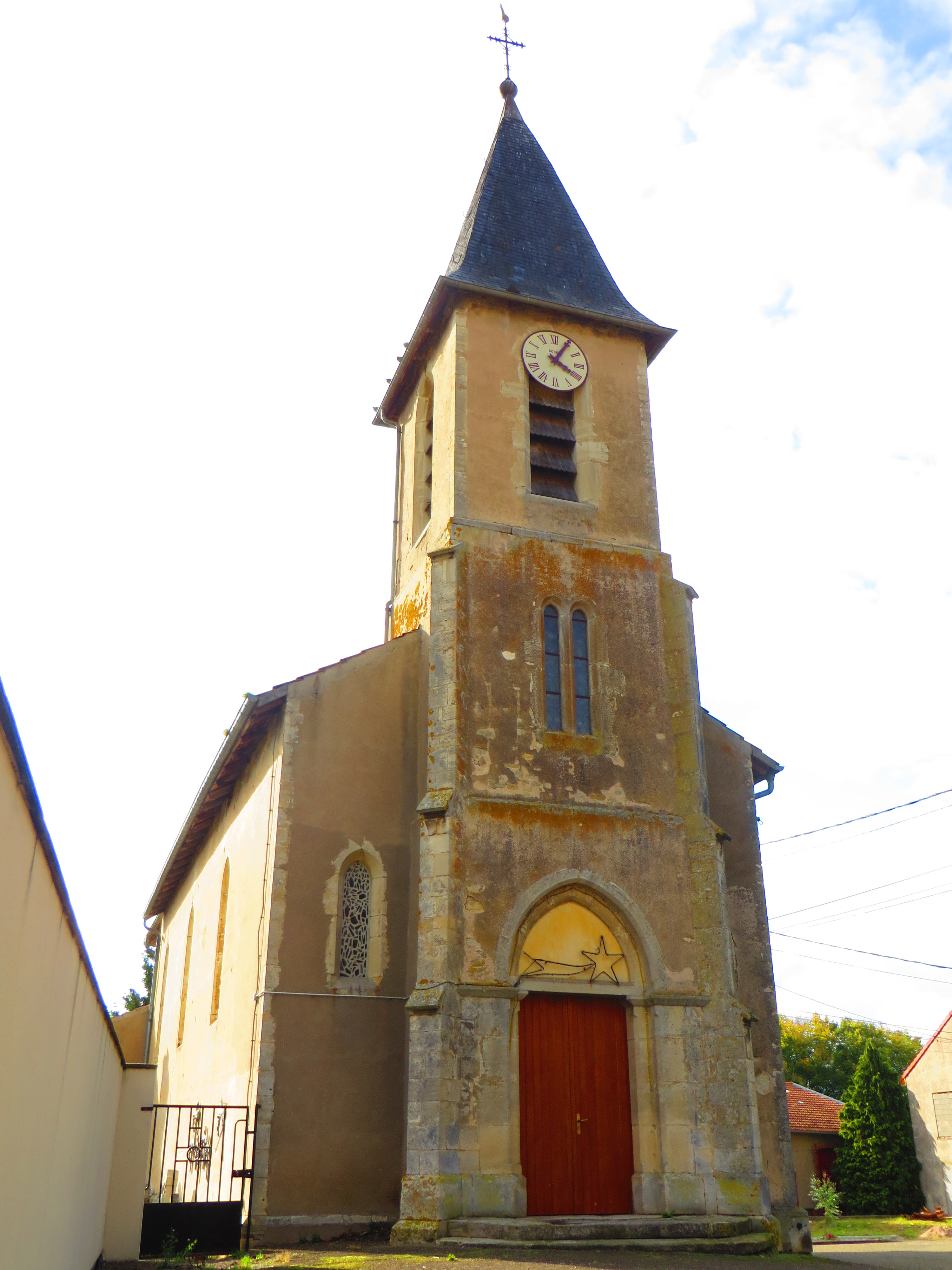 Donjeux Église Saint-Georges